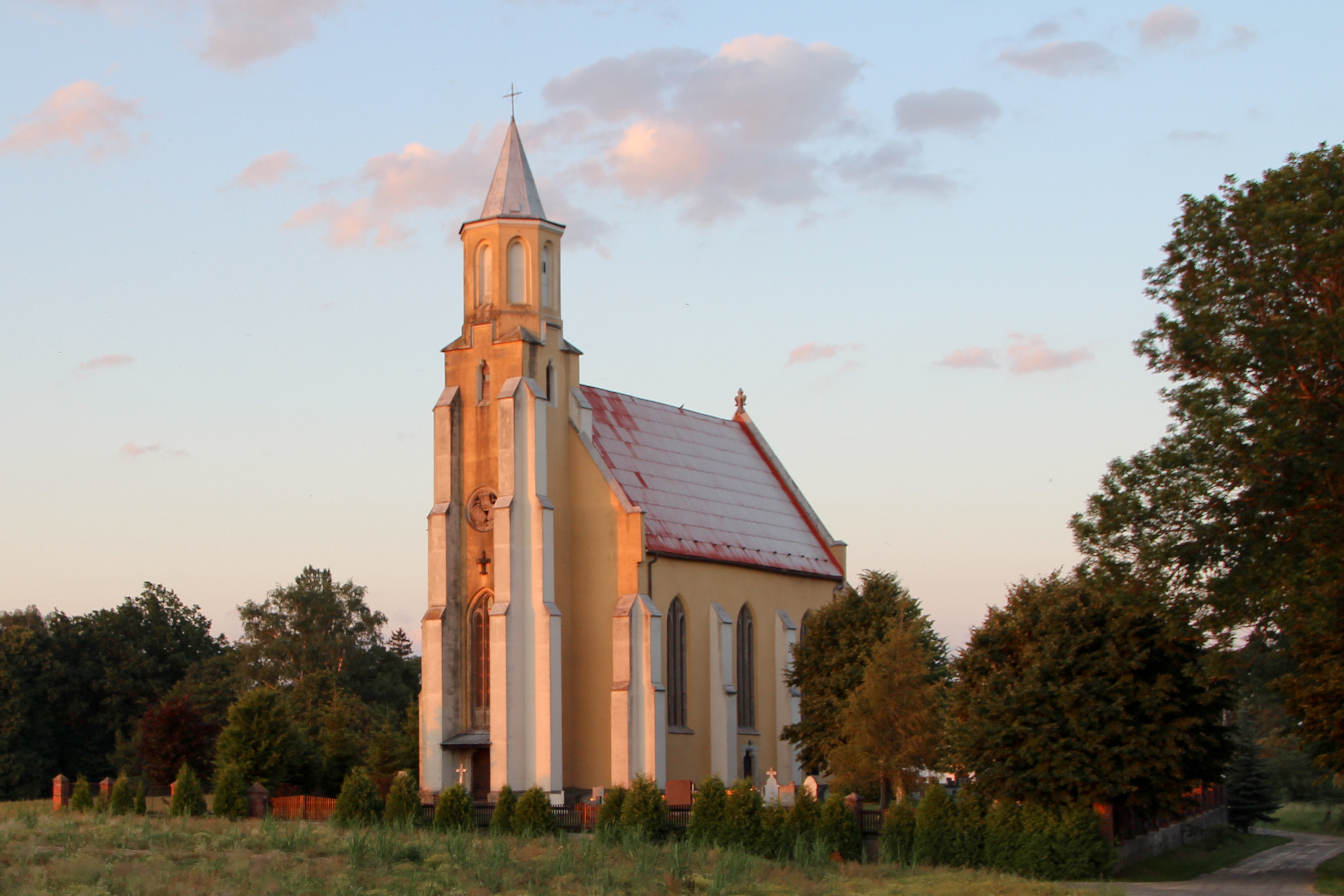 Obec Slezské Pavlovice se nachází v okrese Bruntál, kraj Moravskoslezský.